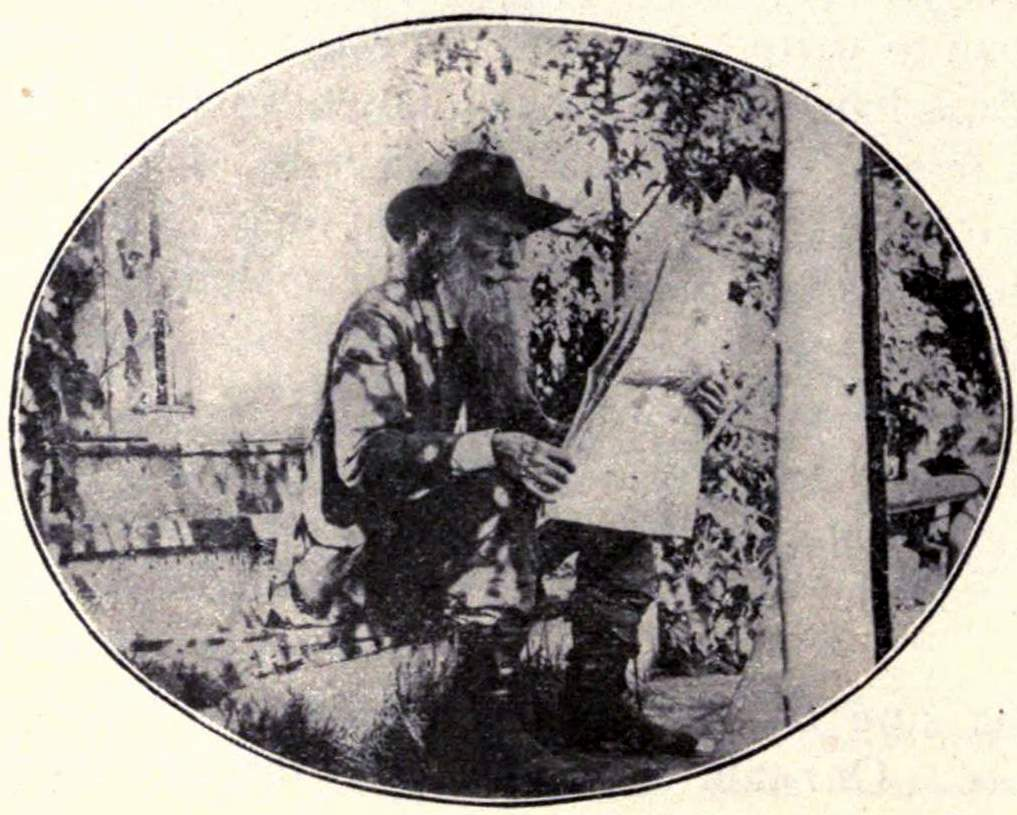 Joaquin Miller, 1905